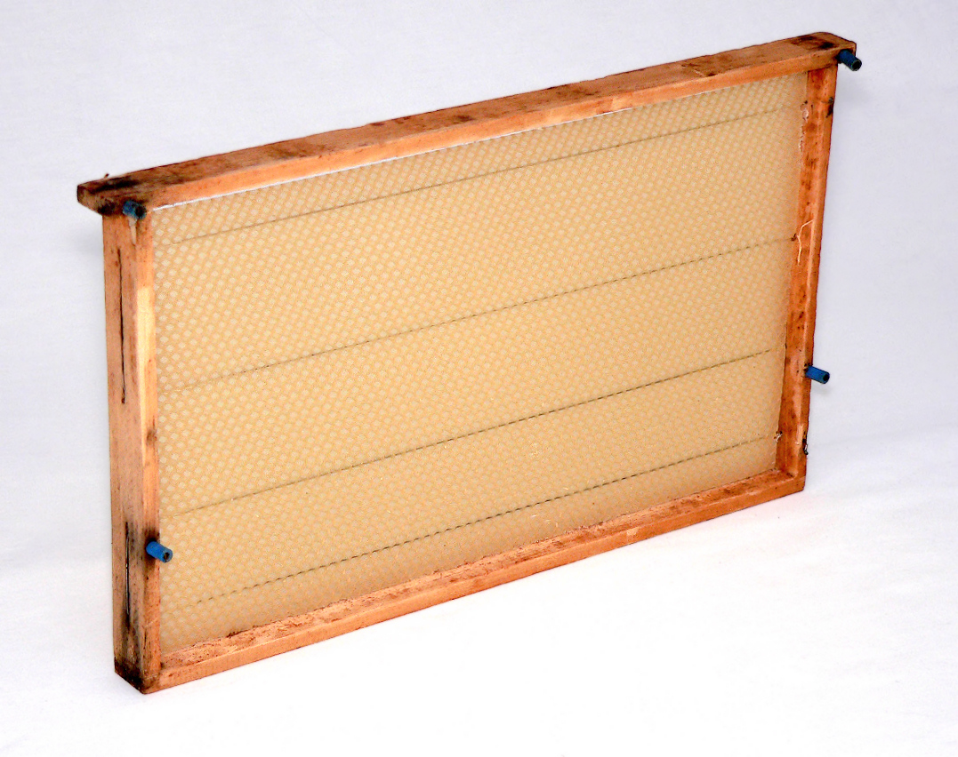 Nutzung in der Imkerei: Rähmchen mit Mittelwand